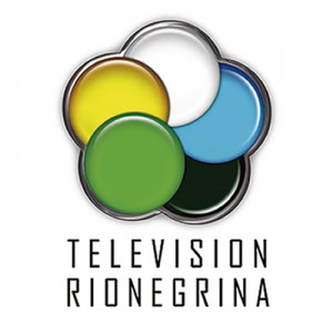 Logo Institucional de Televisión Rionegrina